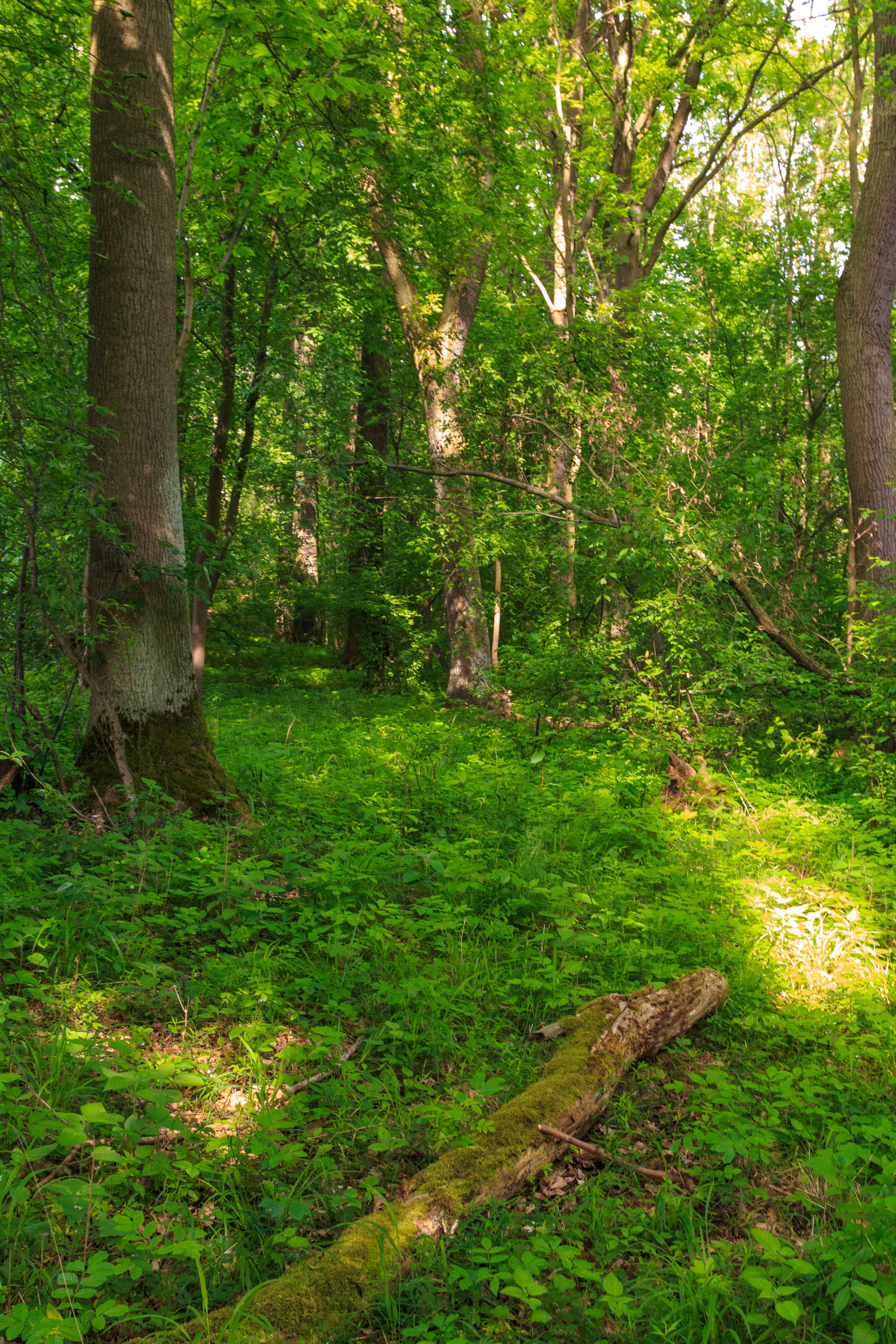 Přírodní rezervace Kovačská bažantnice Project: Chráněná území.